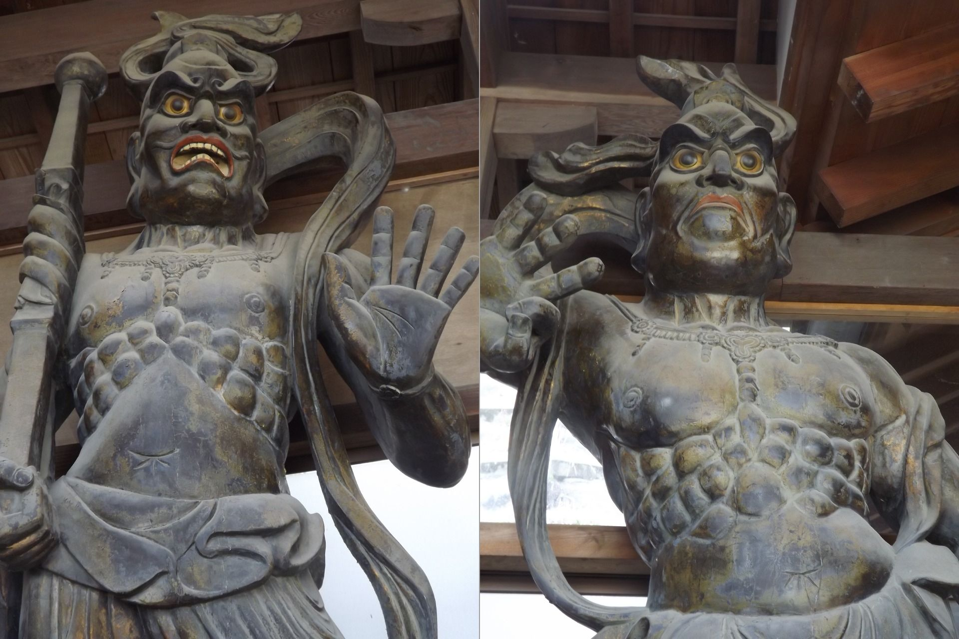 泰山寺の本堂と客殿の間に仁王像が立っている